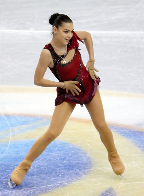 ソトニコワ金メダリスト